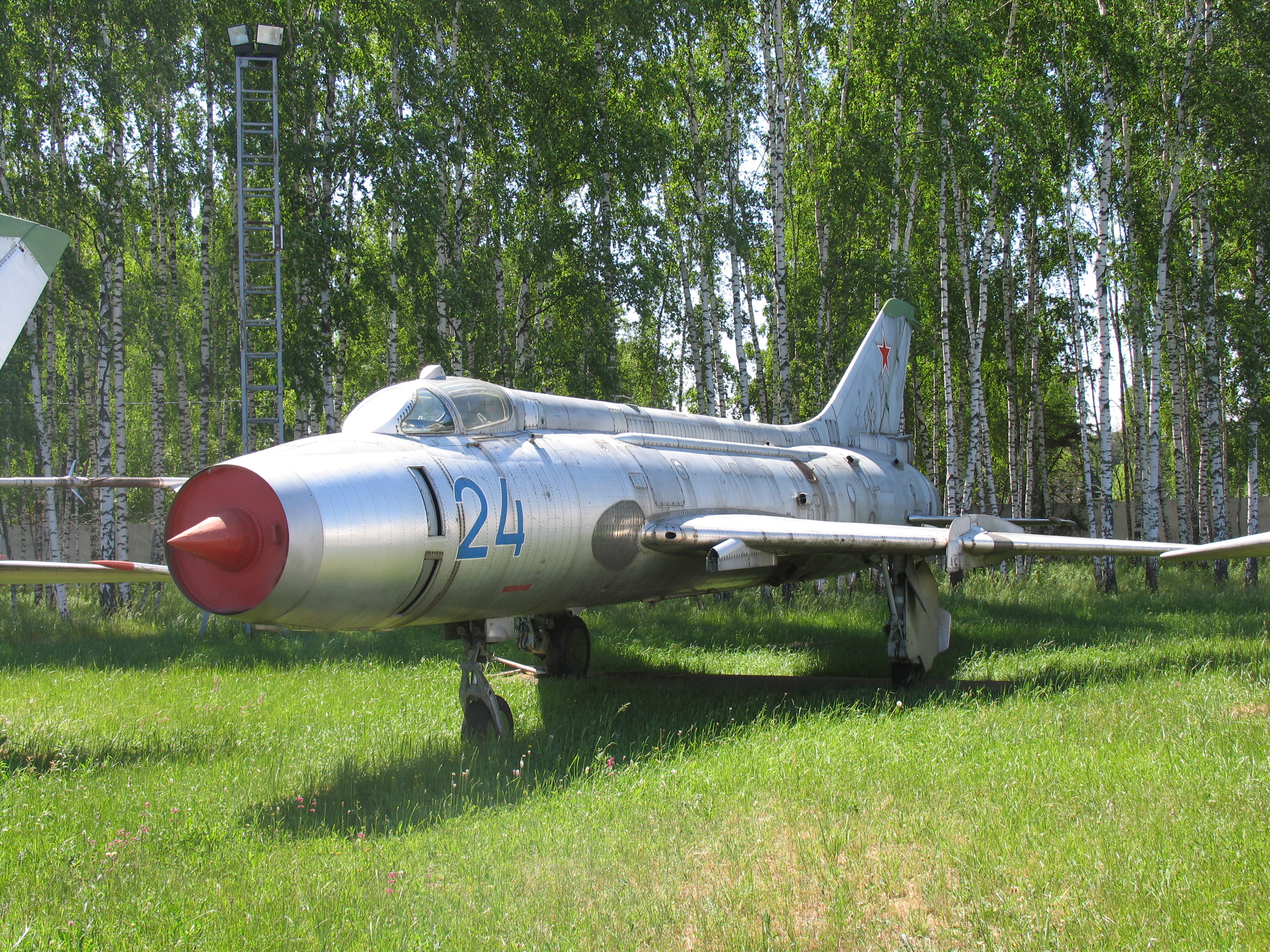 Су-17 в Центральном музее ВВС.